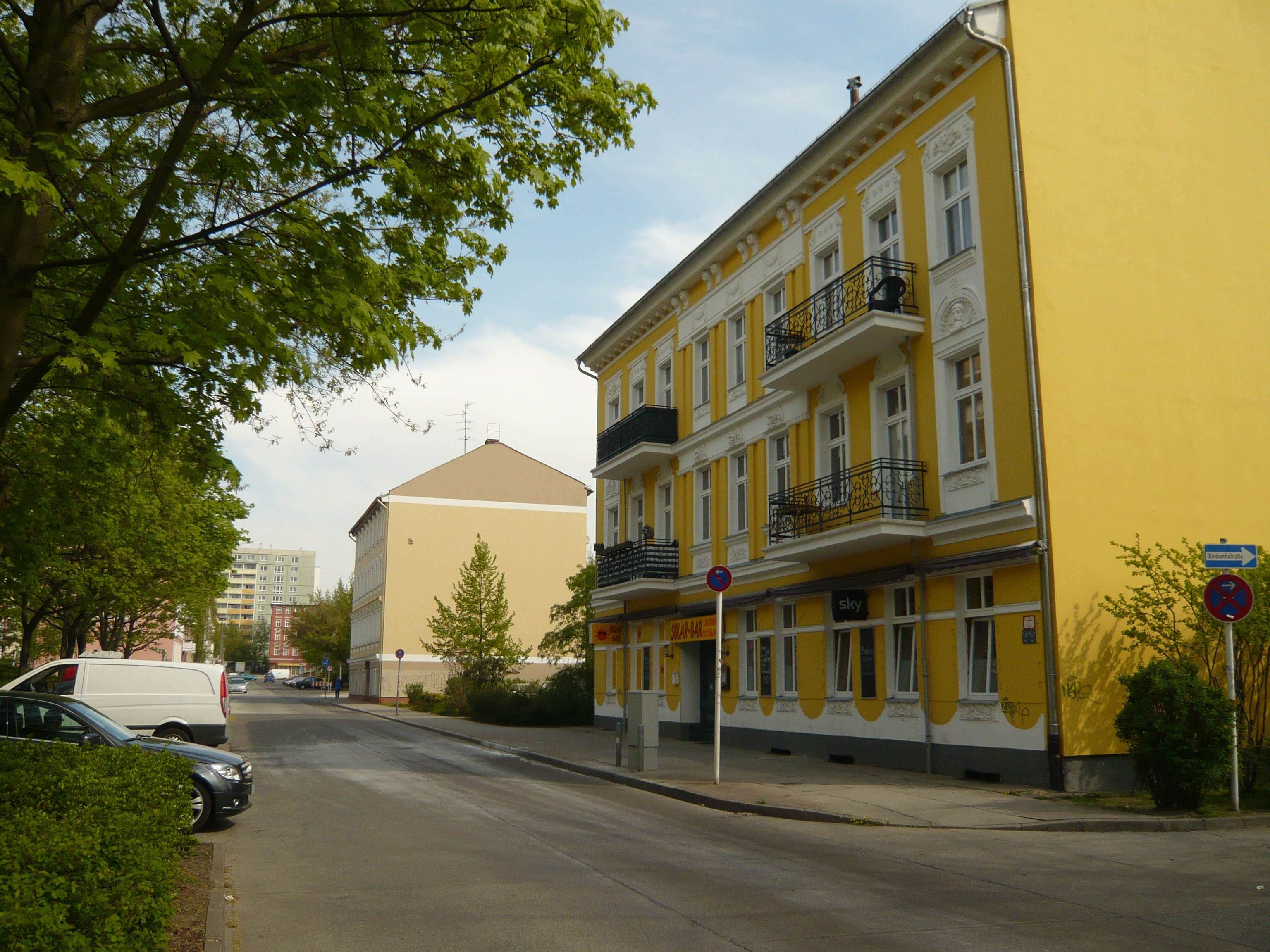 Friedrichsfelde, Robert-Uhrig-Straße (Nordabschnitt)